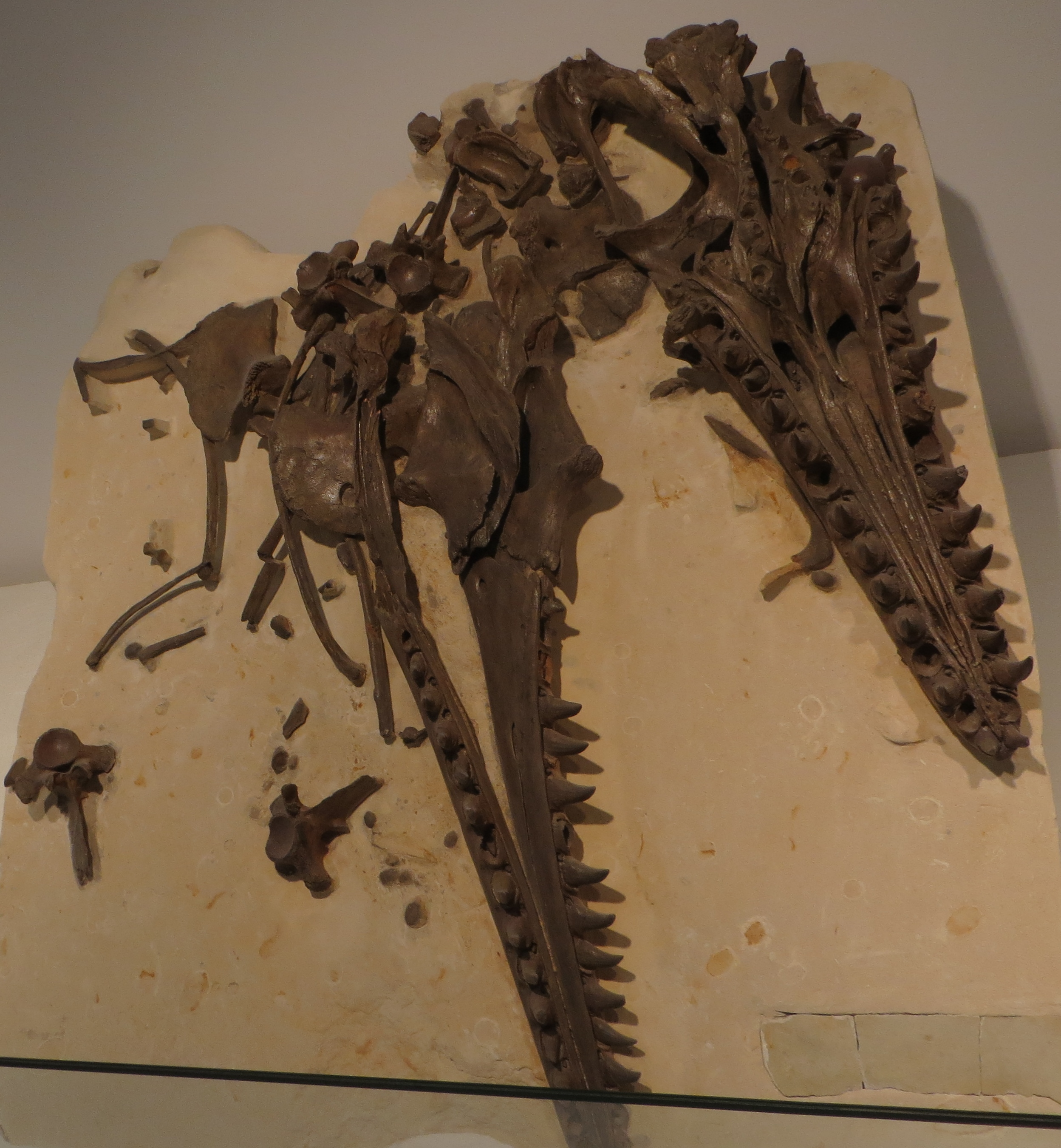 Fossil - Took The picture at Royal Belgian Institute of Natural Sciences, Brussels